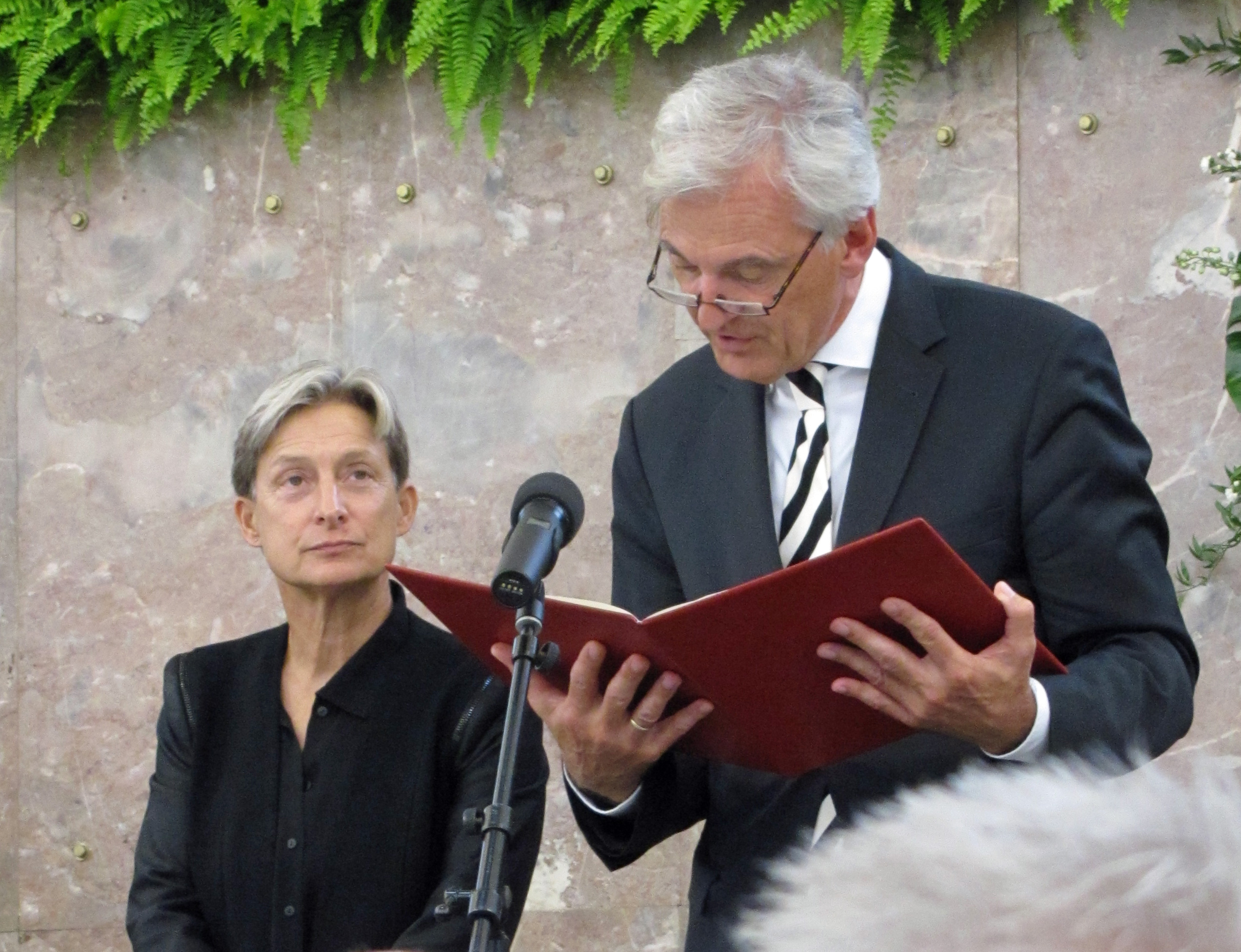 Adorno-Preis 2012. Judith Butler und Felix Semmelroth, in der Frankfurter Paulskirche.